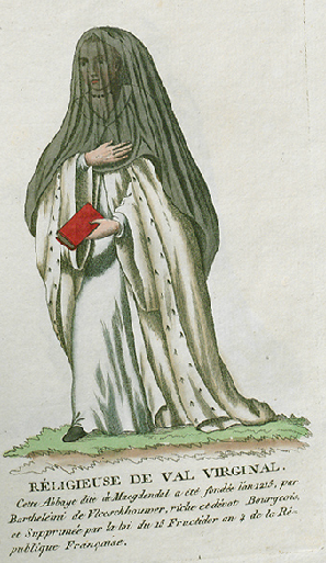 Collection de costumes de tous les ordres monastiques, supprimés à differentes époques, dans la ci-devant Belgique, Bruxelles, Philippe Joseph Maillart et sœur, 1811